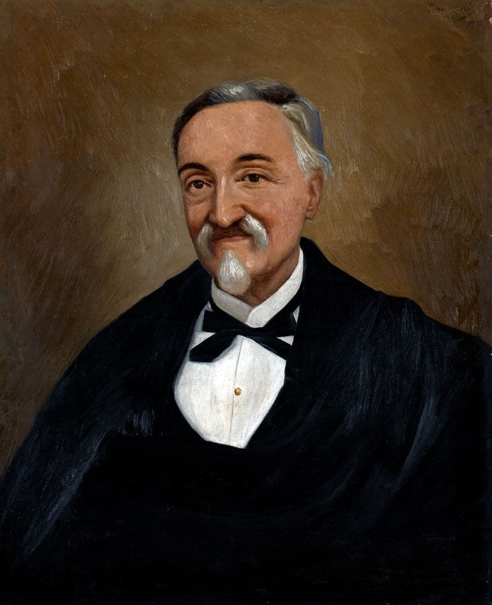 Manuel de Ascázubi y Matheu (1804–1876)